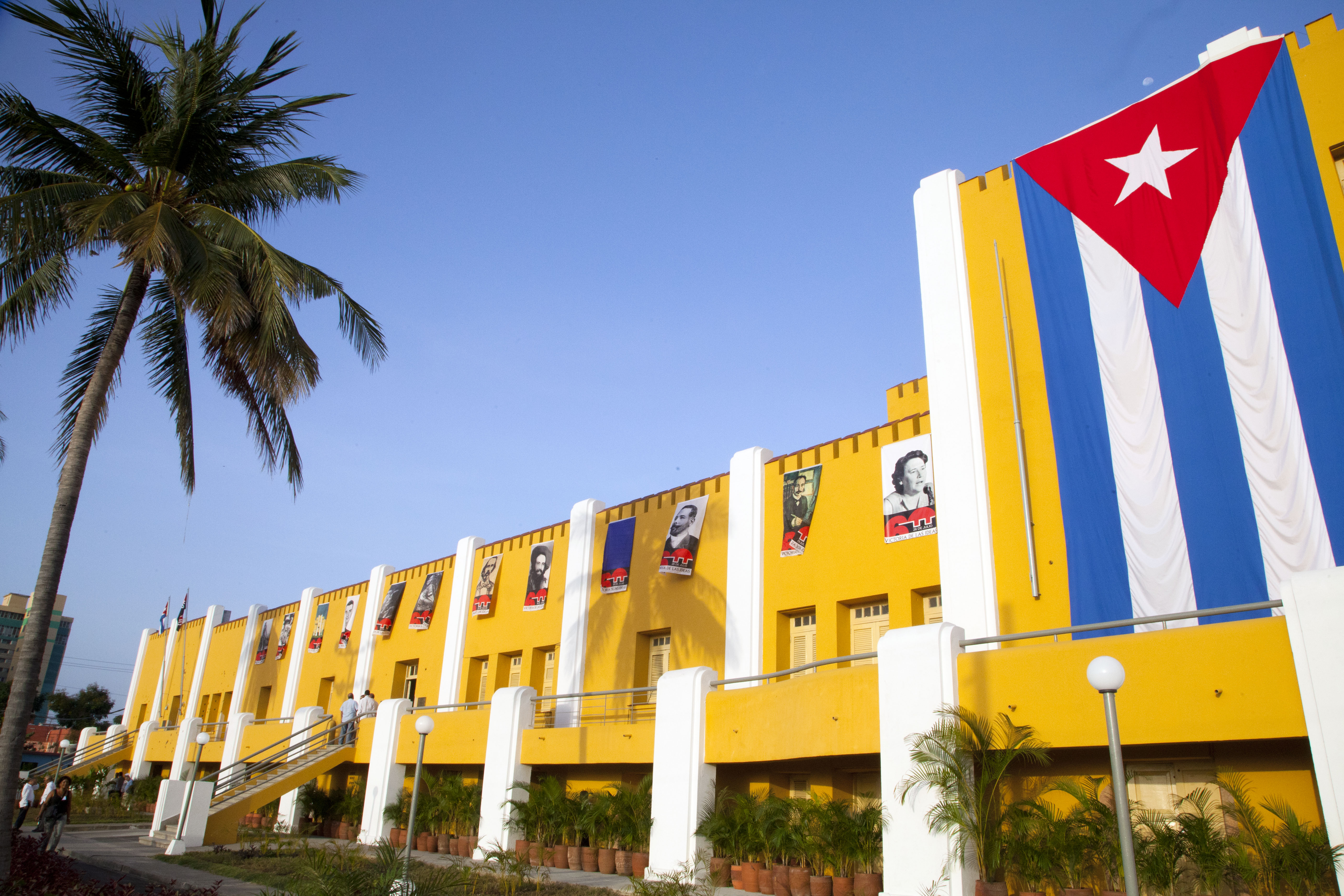 Moncada Barracks — in Santiago de Cuba (Cuba), 26 de julio de 2013. El Canciller Ricardo Patiño, junto a jefes de Estado y de delegación, asistió al evento de conmemoración al 60 aniversario del Asalto al Cuartel Moncada en 1953. Por Ecuador además participó la Ministra de Defensa, María Fernanda Espinosa. Foto: Fernanda LeMarie - Cancillería del Ecuador.